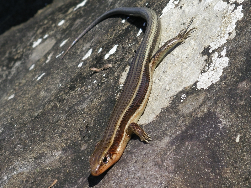 Plestiodon japonicus(ニホントカゲ), Nagasaki(長崎市)